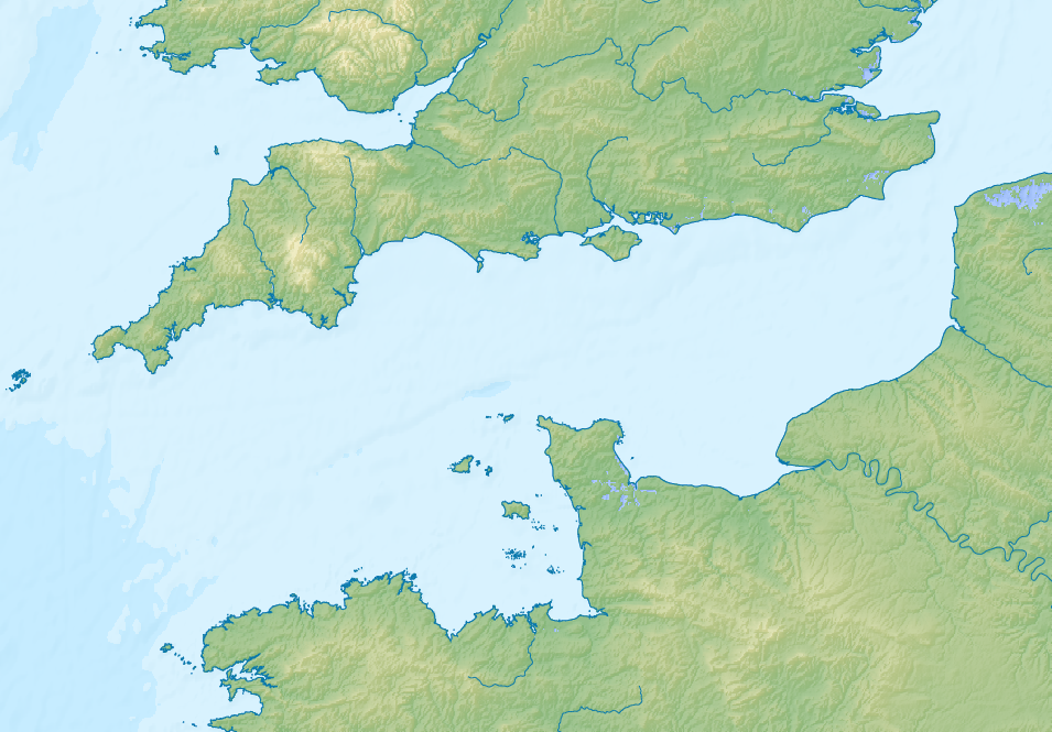 Физическая карта пролива Ла-Манш.